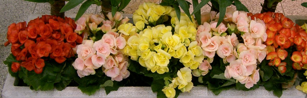 Begonia